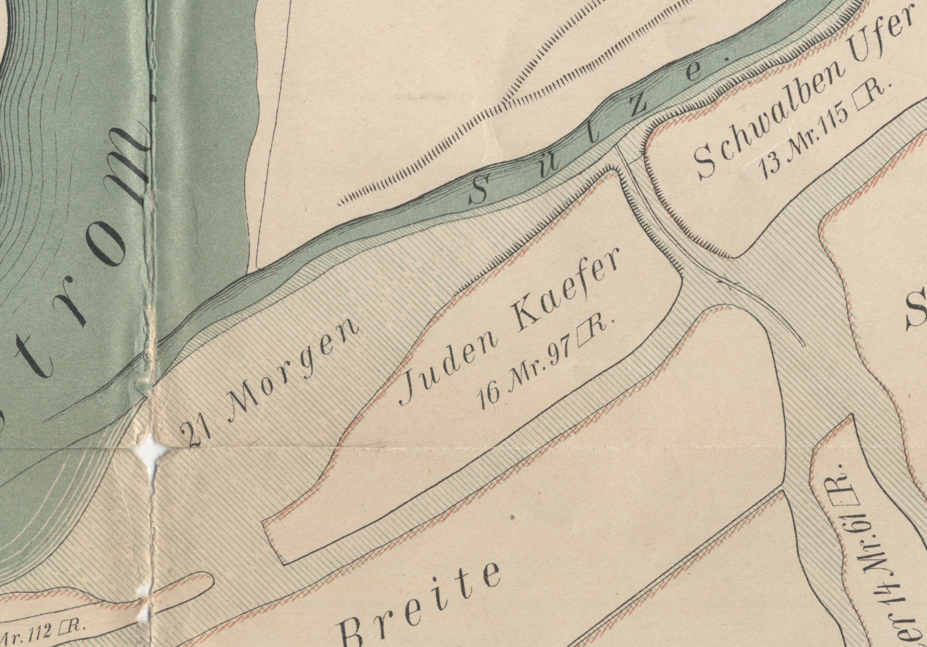 Ausschnitt einer Karte von Buckau mit dem Grundstück Juden Kaefer, einem historischen jüdischen Friedhof, Karte nicht eingenordet, Norden ist links